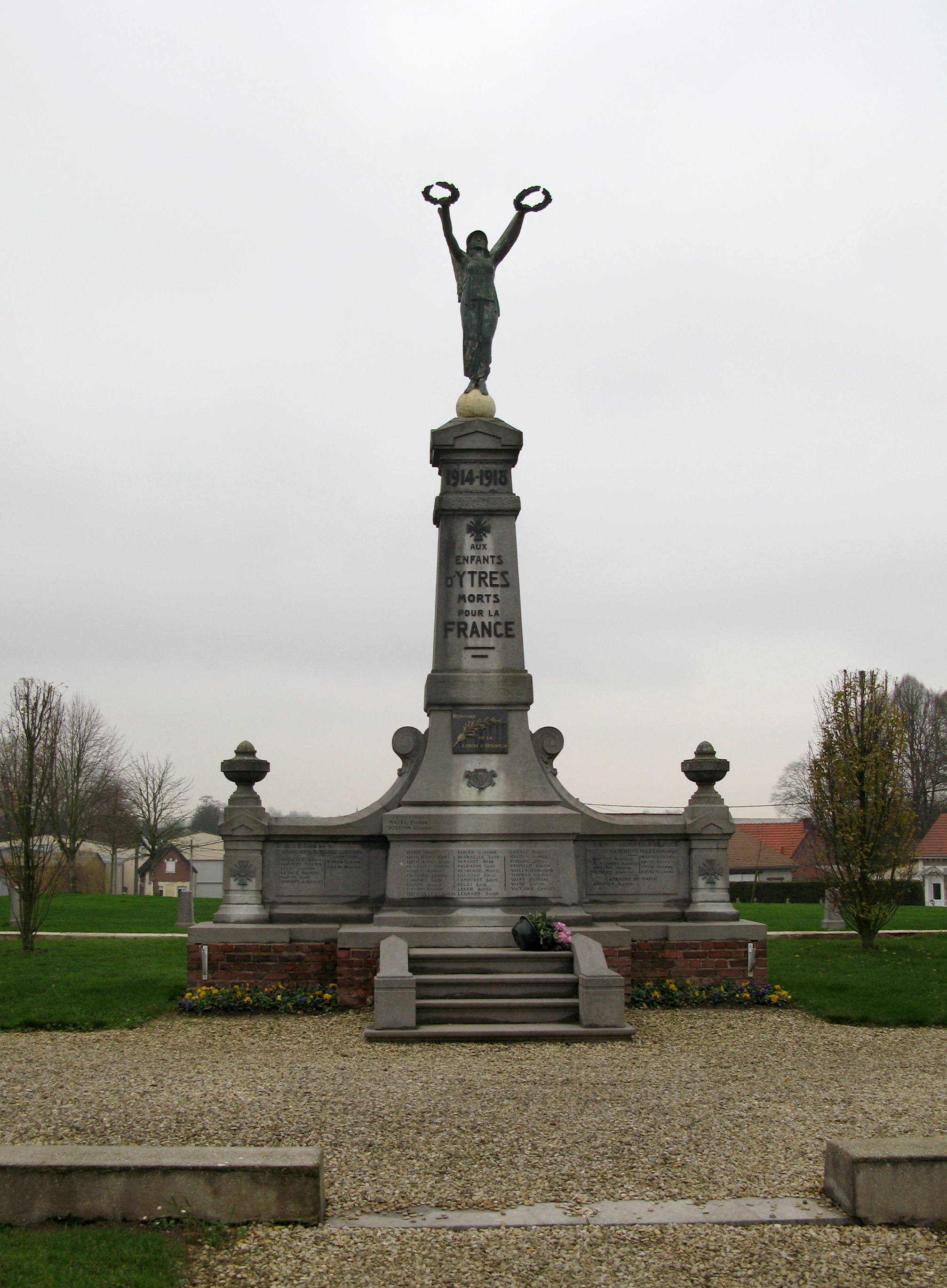 Ytres (Pas-de-Calais, France) - Le monument-aux-morts. .